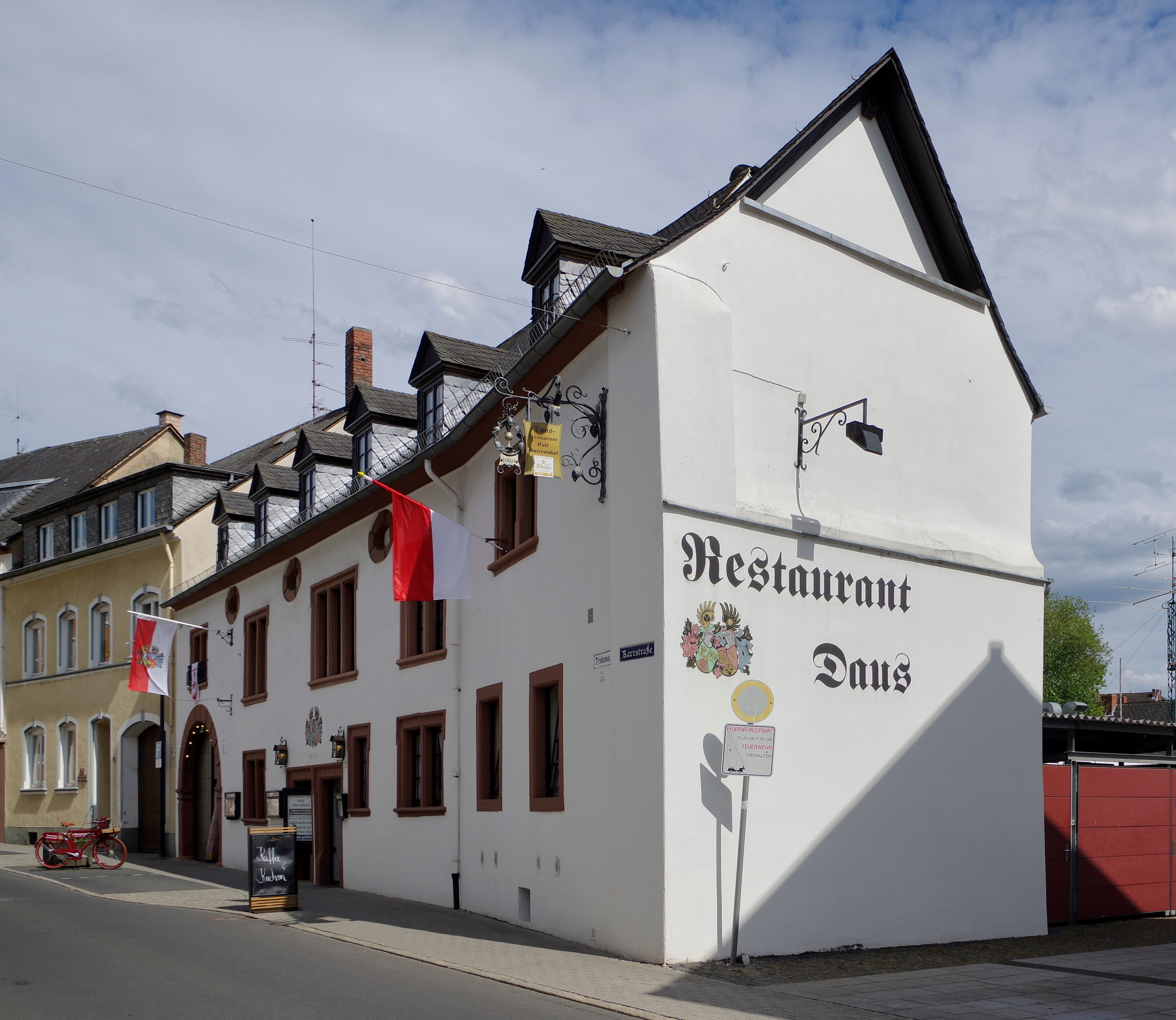 Wittlich, Karrstraße 19/21, Haus Daus, Putzbau mit Zwillings- und Drillingsfenstern, im Kern aus dem früheren 16. Jahrhundert, Umbau 1686